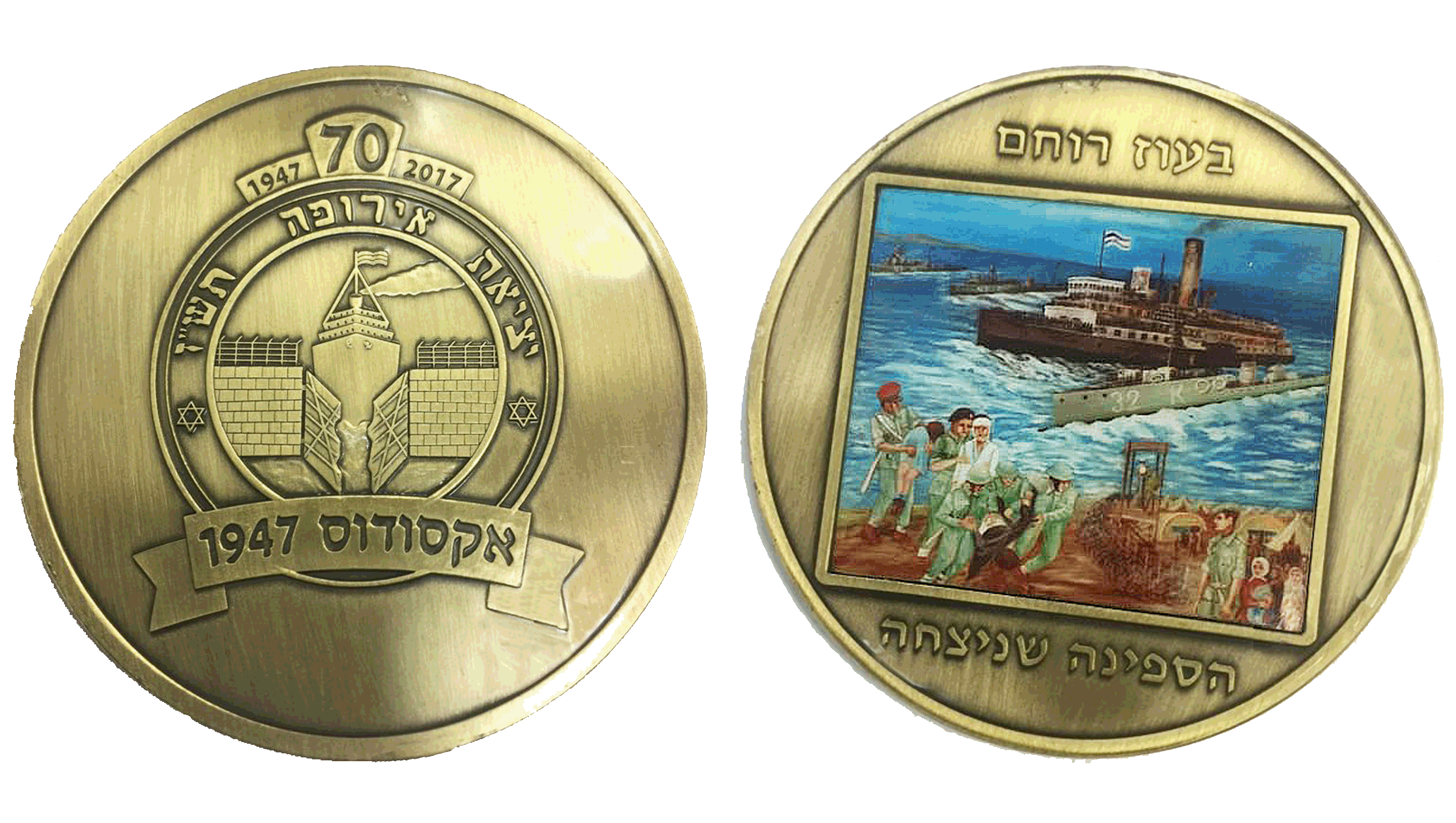 שני צידי המדליה לזכר 70 שנה לאירועי האקסודוס 1947